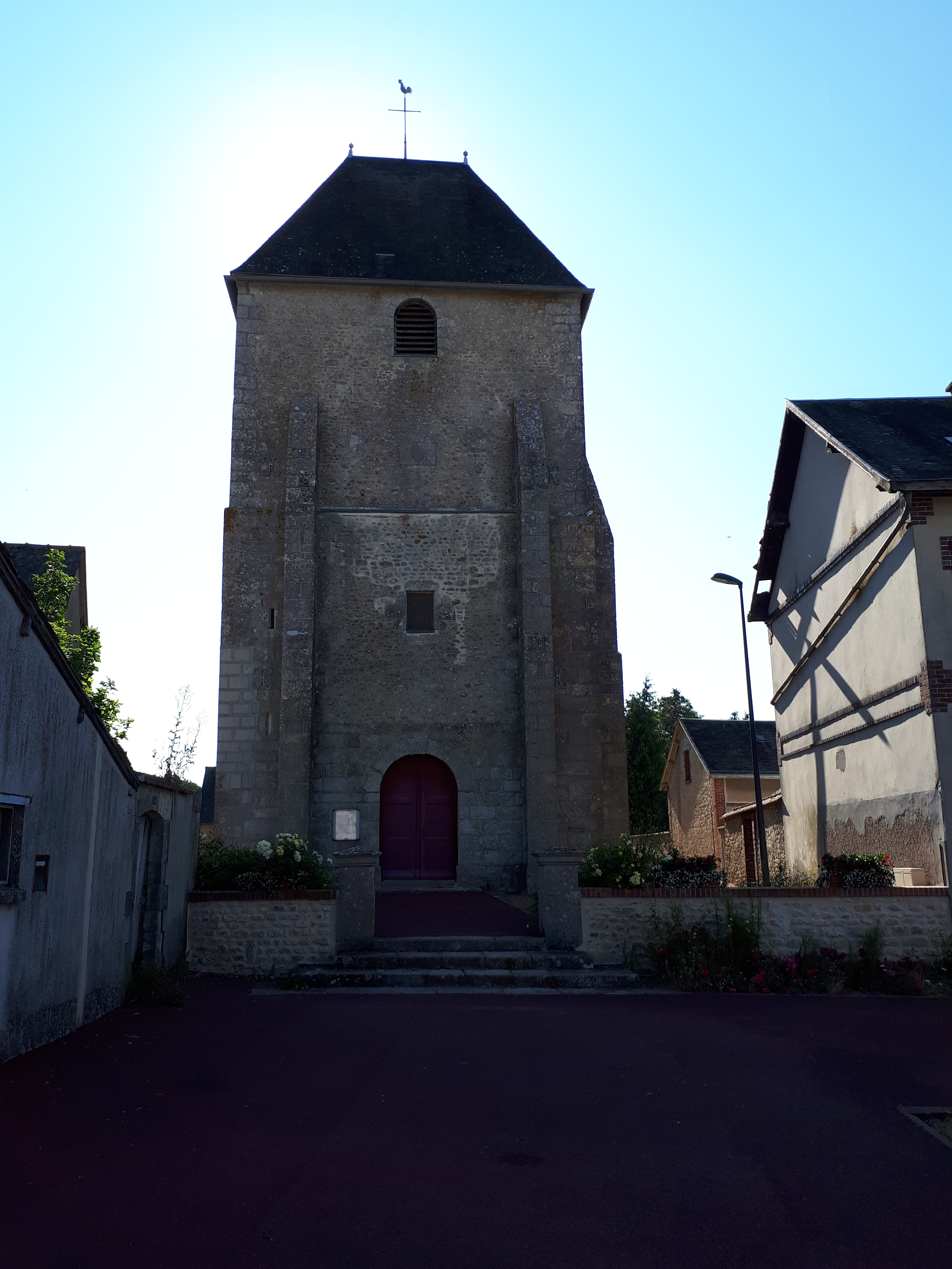 L'église de Boisville-la-Saint-Père.